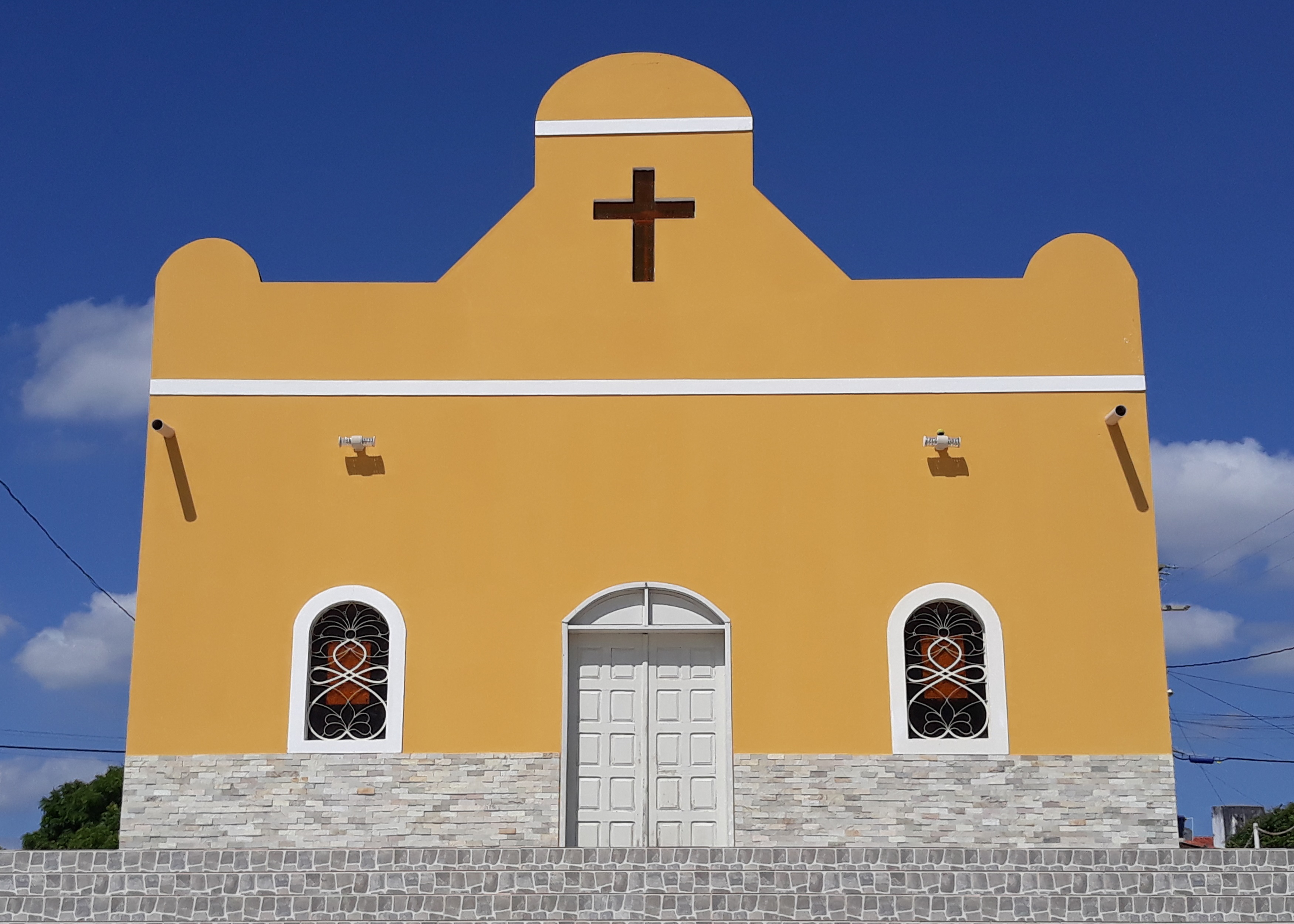 Capela Menino Jesus de Praga, da paróquia de Nossa Senhora da Conceição, no bairro Princesinha do Oeste, em Pau dos Ferros, Rio Grande do Norte (Brasil)